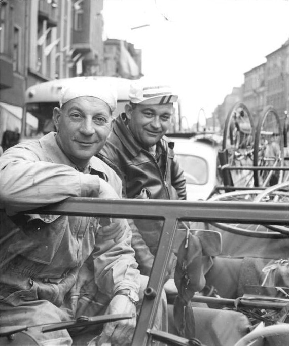 Friedensfahrt, französisches Begleitfahrzeug Zentralbild Wendorf Ko-L 13.5.1960 - XIII. Friedensfahrt 1960 - 9. Etappe. UBz: Der französische Trainer Oubron im Begleitfahrzeug.